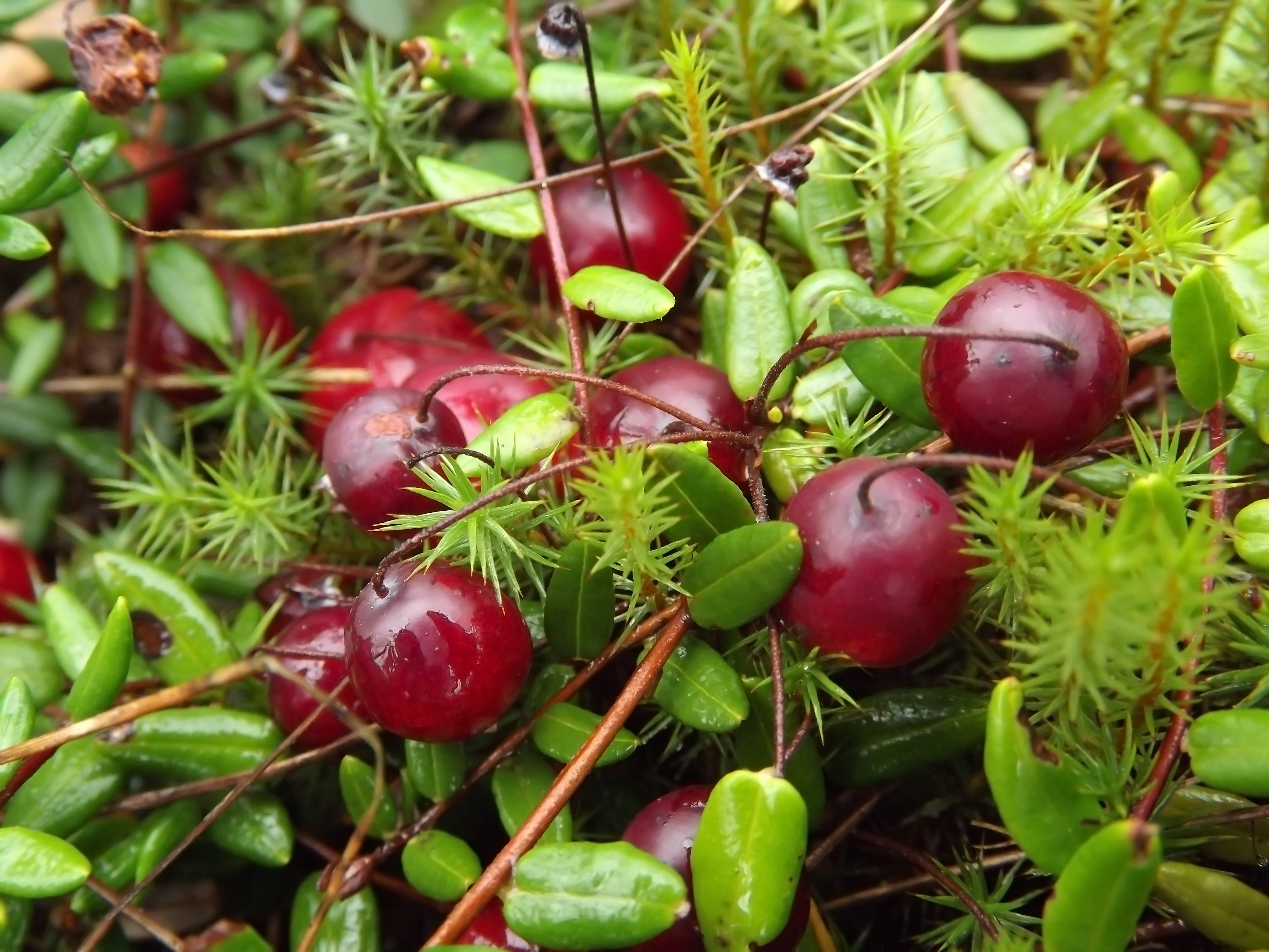 «Деснянсько-Старогутський», Середино-Будський р-н: Зноб-Трубчевська, Старогутська, Стягайлівська, Очкинська, Нововасилівська, Кривоносівська, Кренидівська с/р; ДП «С.-Будський агролісгосп»: кв. 1-10, 12-14, 18, 20, 21 (вид. 1-11, 17), 22, 23 (вид. 1-12, 19), 51, 52 (вид. 10-46), 53, 76-77, 78 (вид. 1-27), 80 (вид. 1-22), 81 (вид. 23), 29, 31 (вид. 1-13, 17-41)